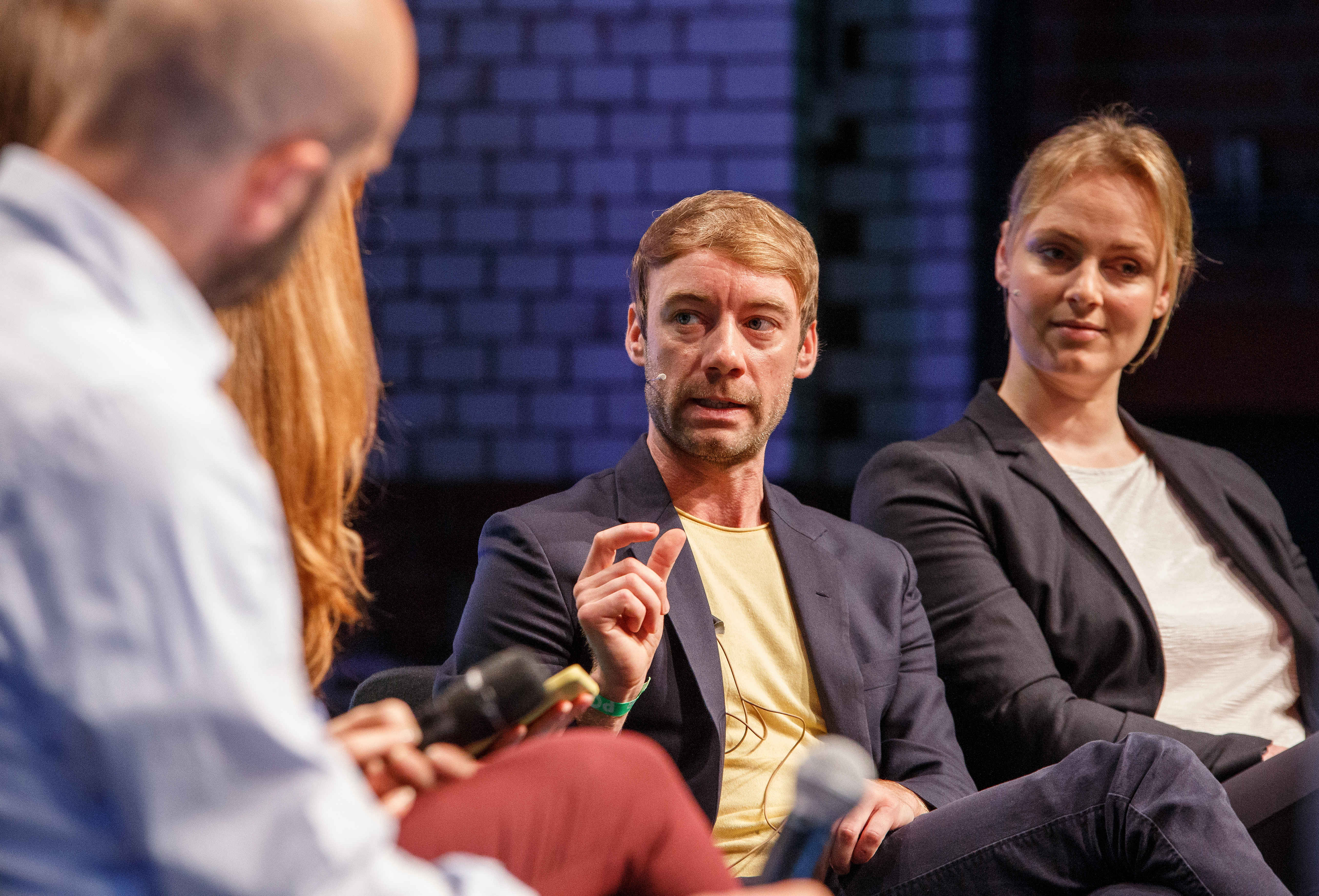 03.05.2018, Berlin: Discussion: Rechtsruck in Deutschland - Linksabbiegen (un)möglich? Speaker: Johannes Hillje, Elisabeth Wehling, Marco Bülow, Julia Ebner. Die re:publica ist eine der weltweit wichtigsten Konferenzen zu den Themen der digitalen Gesellschaft und findet in diesem Jahr vom 02. bis 04. Mai in der STATION-Berlin statt. Foto: Jan Michalko/re:publica